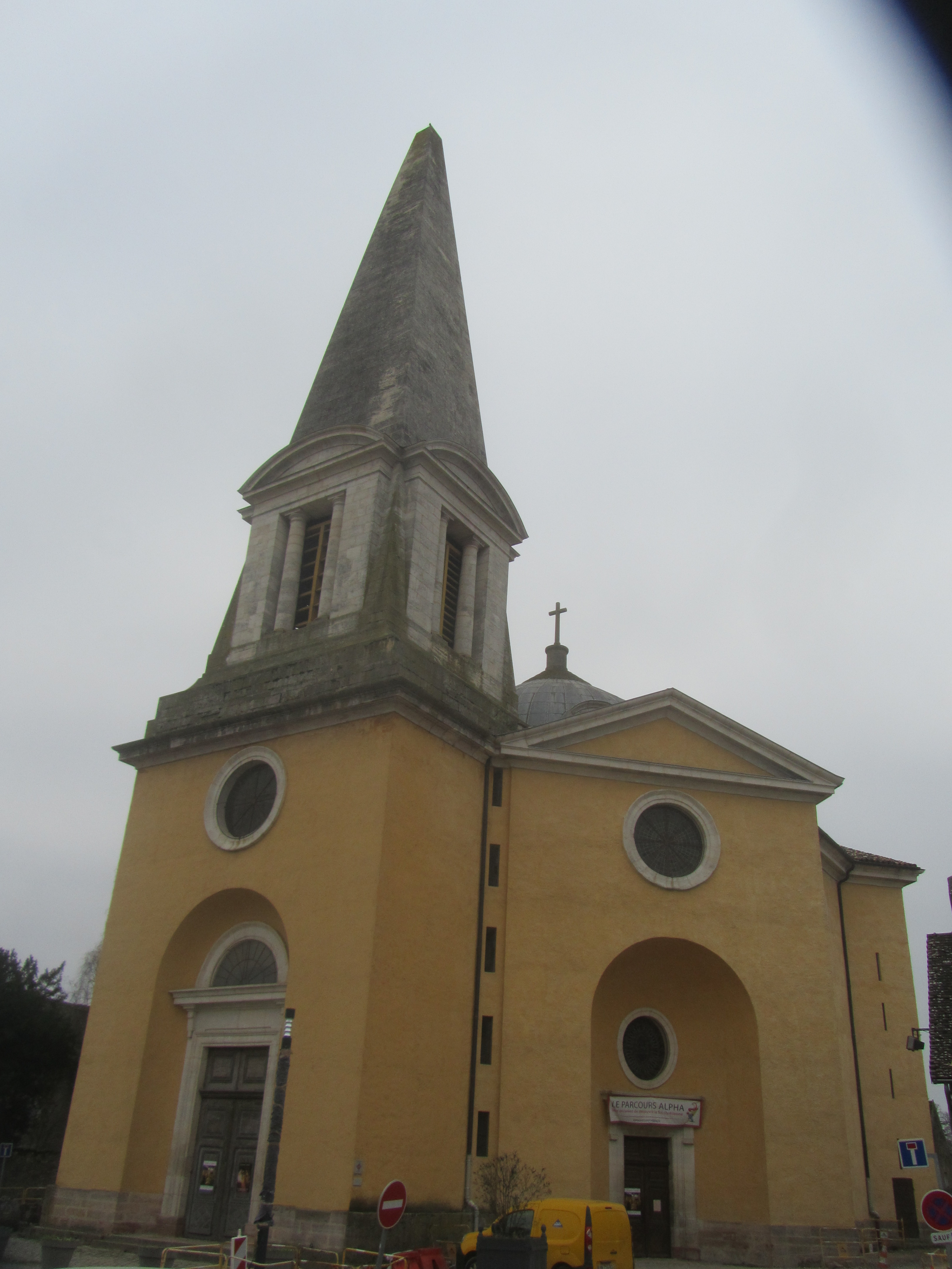 la façade de l'église de Givry avec son clocher en forme d'obélisque